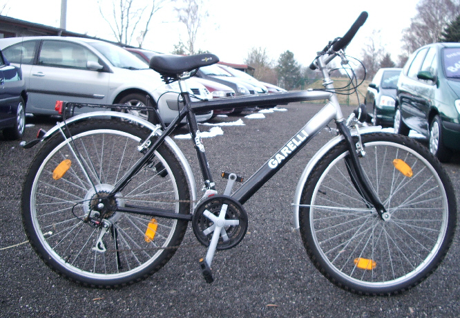 Garelli Fahrrad, Baujahr 2003. Eigenes Fahrrad, selbst fotografiert.